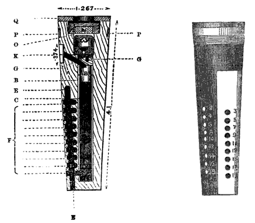 Boxer-Zeitzünder für Hinterlader, 9 Sekunden